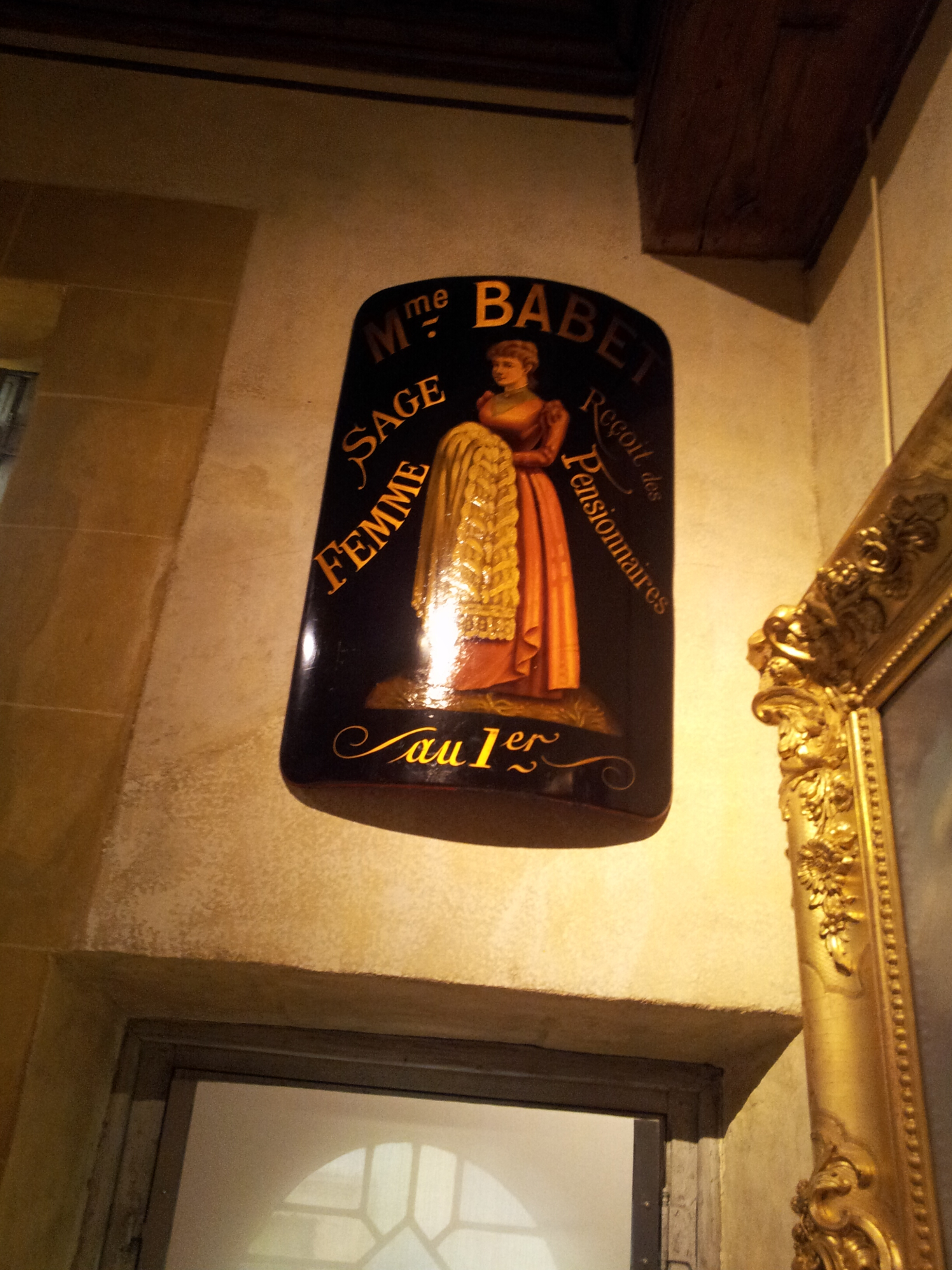 Une enseigne de sage-femme - Musée des arts et métiers de Lyon